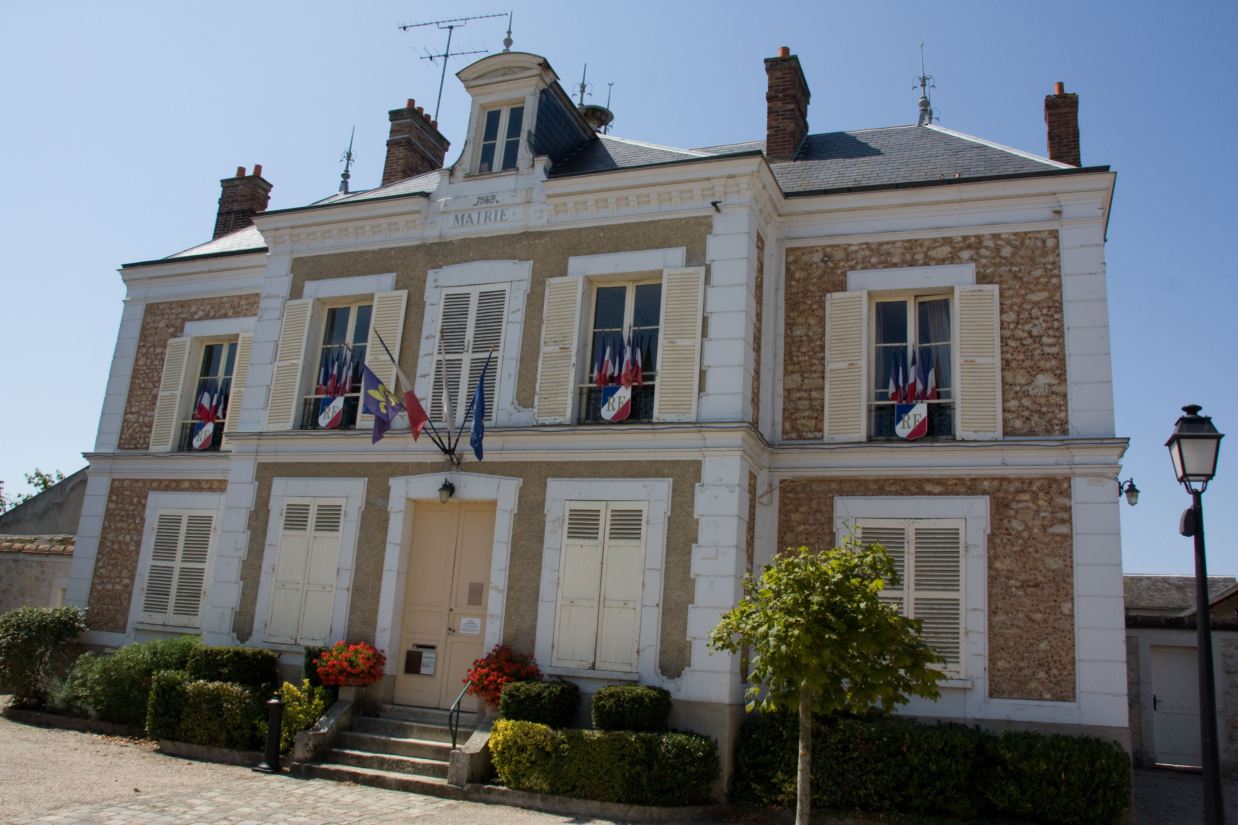 Mairie de Moigny-sur-École, Moigny-sur-École, Essonne, France